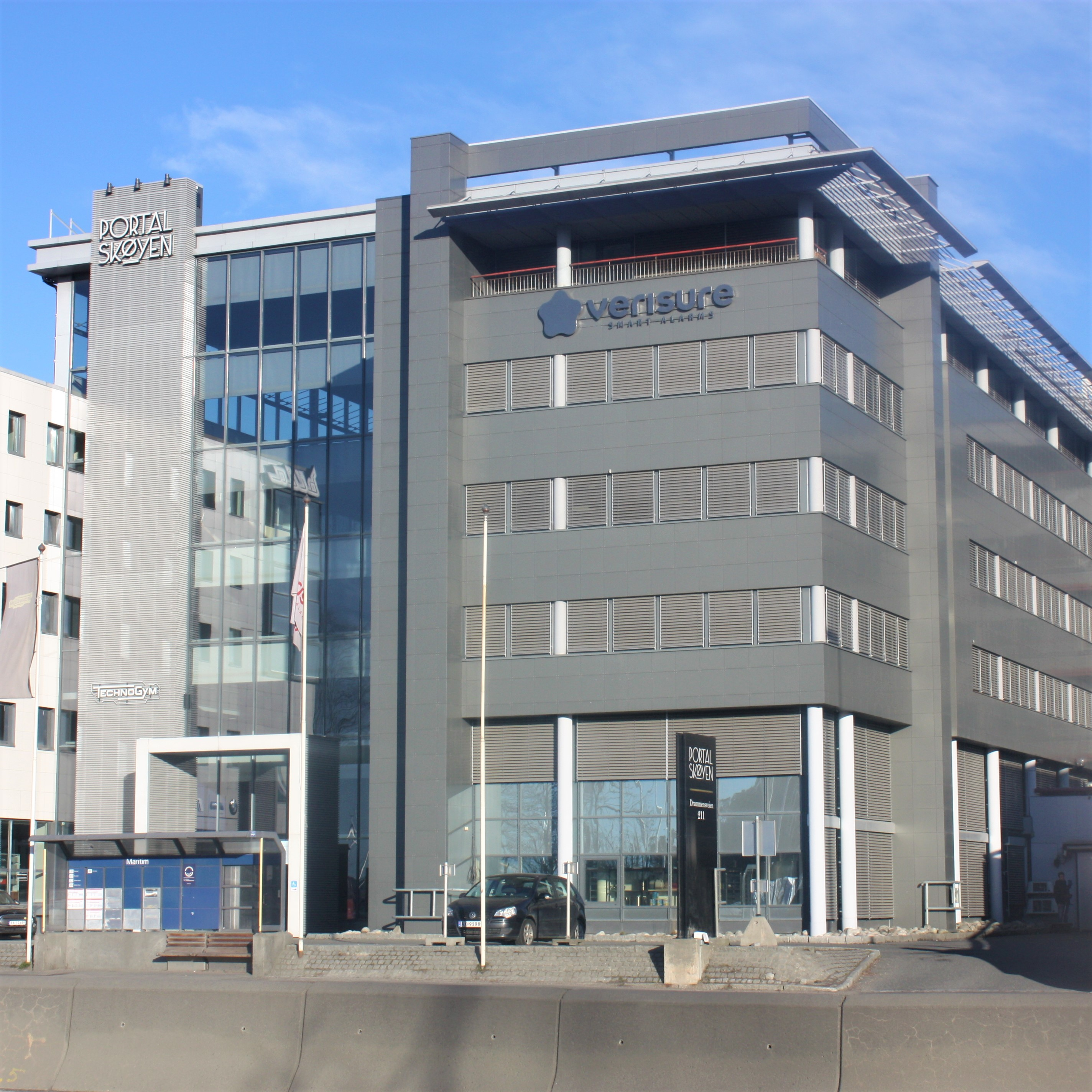 Verisure sitt hovedkontor på Skøyen